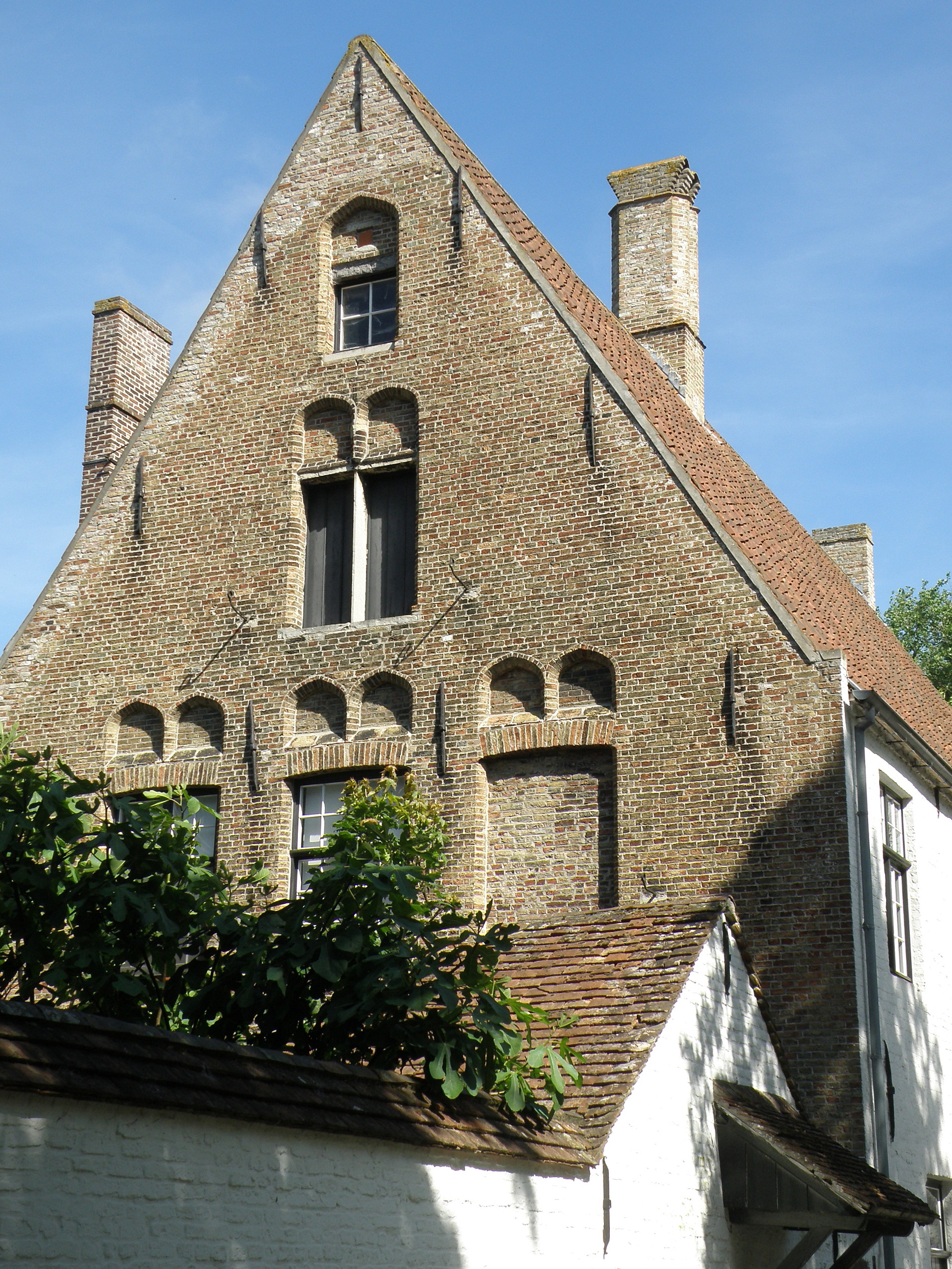 Brugge, Begijnhof. Begijnenhuis nr. 50.